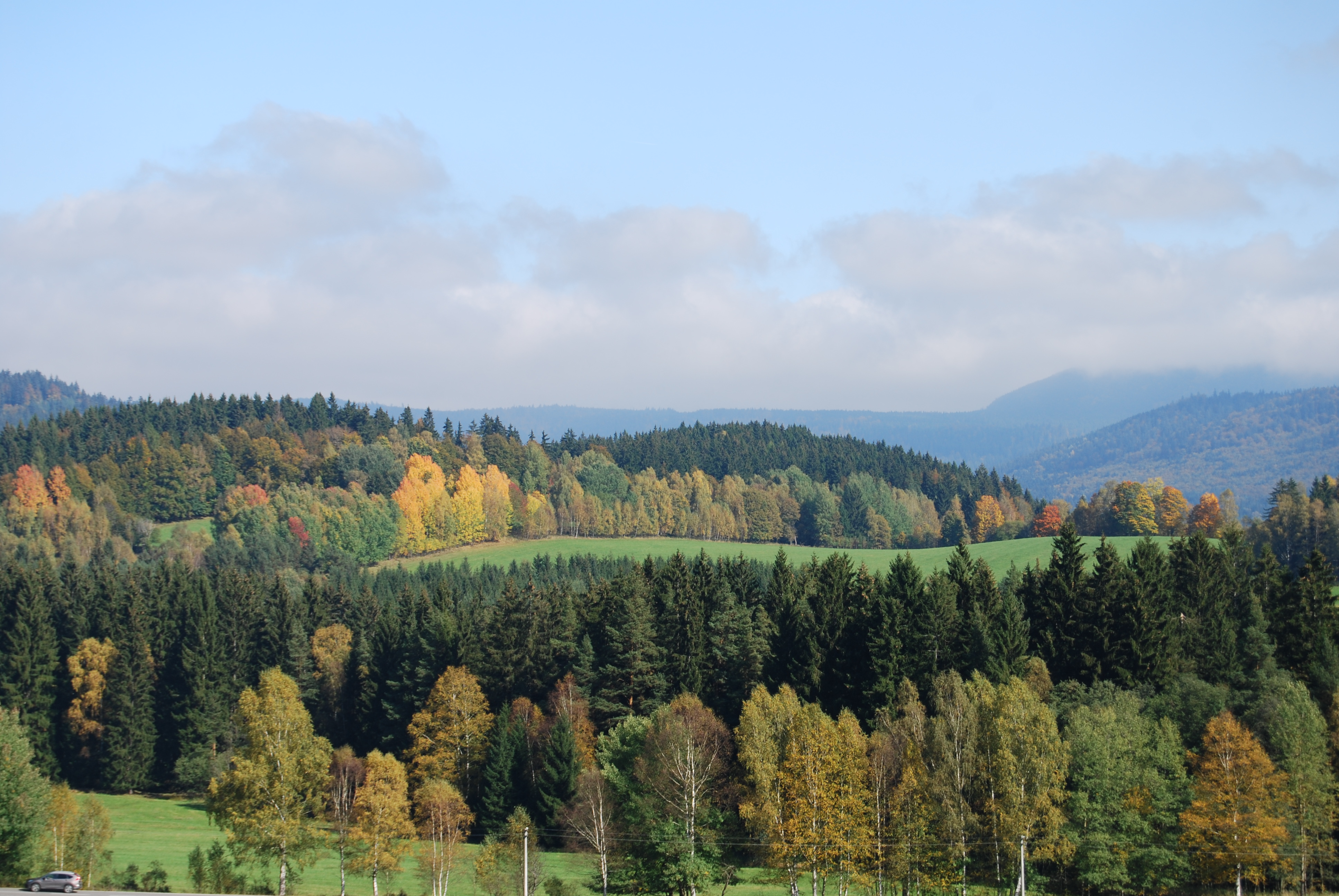 Slatina pod jilmem. Polka (Horní Vltavice). Okres Prachatice. Česká republika.